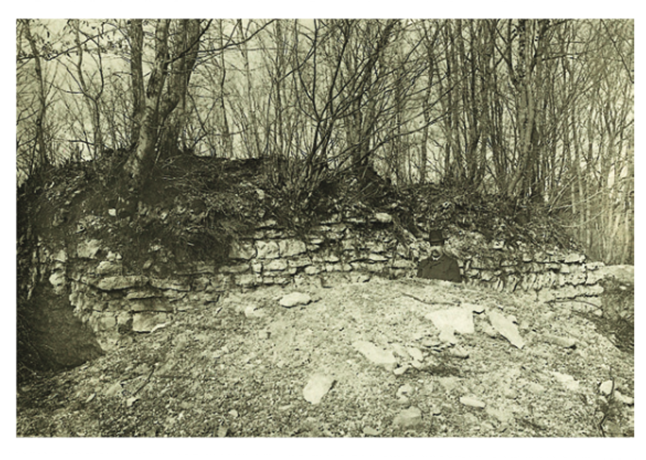 Erhaltungszustand des teilweise freigelegten Wachturms Koblenz Kleiner Laufen zur Zeit der Ausgrabung im Herbst oder Winter 1906/1907 (Blick nach Norden). Die Mauern waren damals noch 1,5 bis 3 m hoch erhalten. Auf dem Foto ist der Grabungsleiter Jakob Heierli zu sehen.